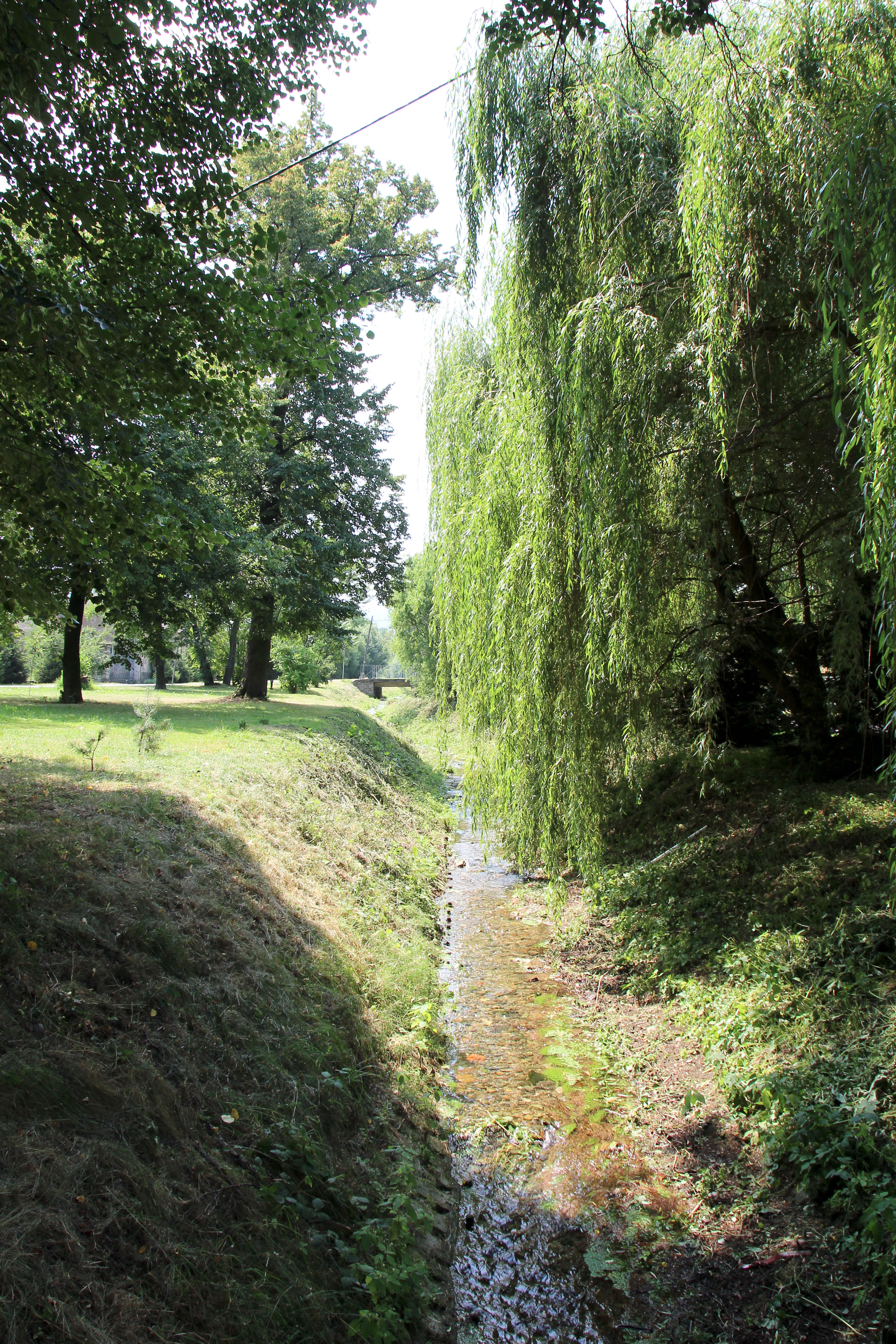 Tarnawka (Hoštický potok/Tarnau) w Unikowicach – wieś w Polsce, w województwie opolskim, w powiecie nyskim, w gminie Paczków.